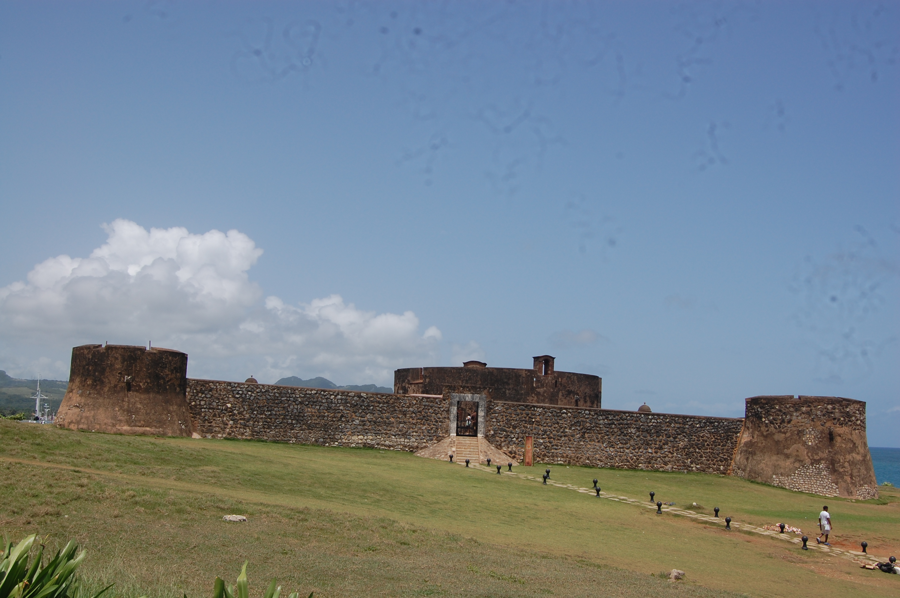 Fortaleza San Felípe, Puerto Plata República Dominciana